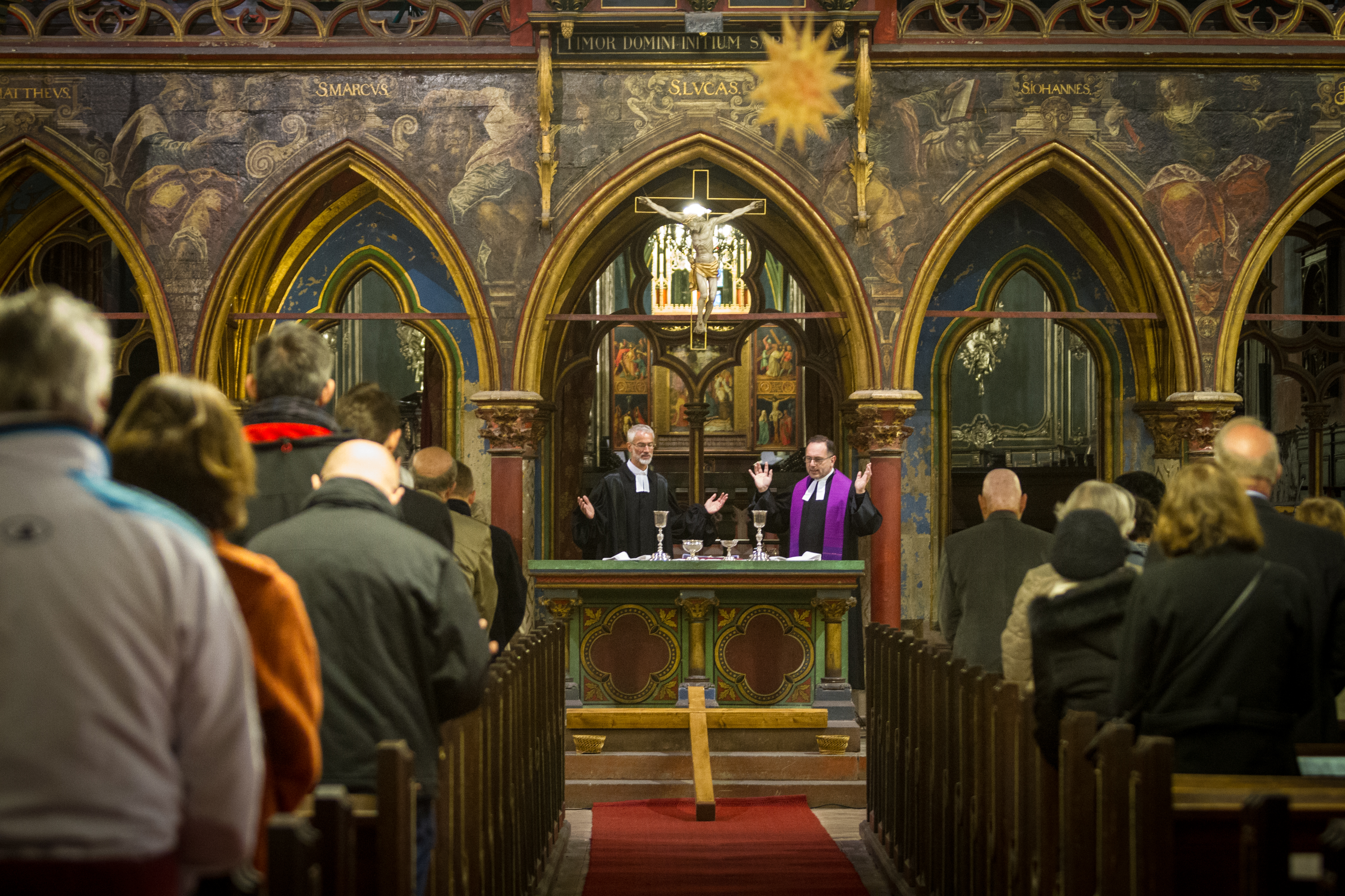 Culte de Sainte Cène église protestante Saint-Pierre-le-Jeune Strasbourg 18 avril 2014 avec les pasteurs Philippe Eber et Eric Schiffer.